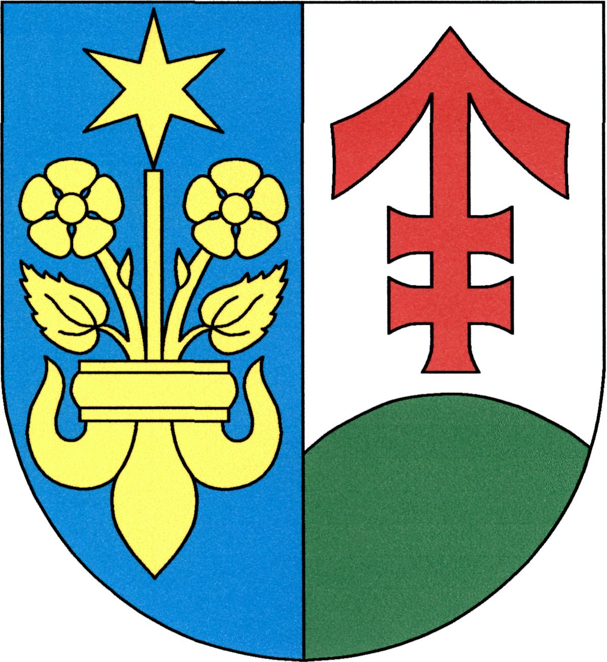 Znak obce Záchlumí (okres Tachov)